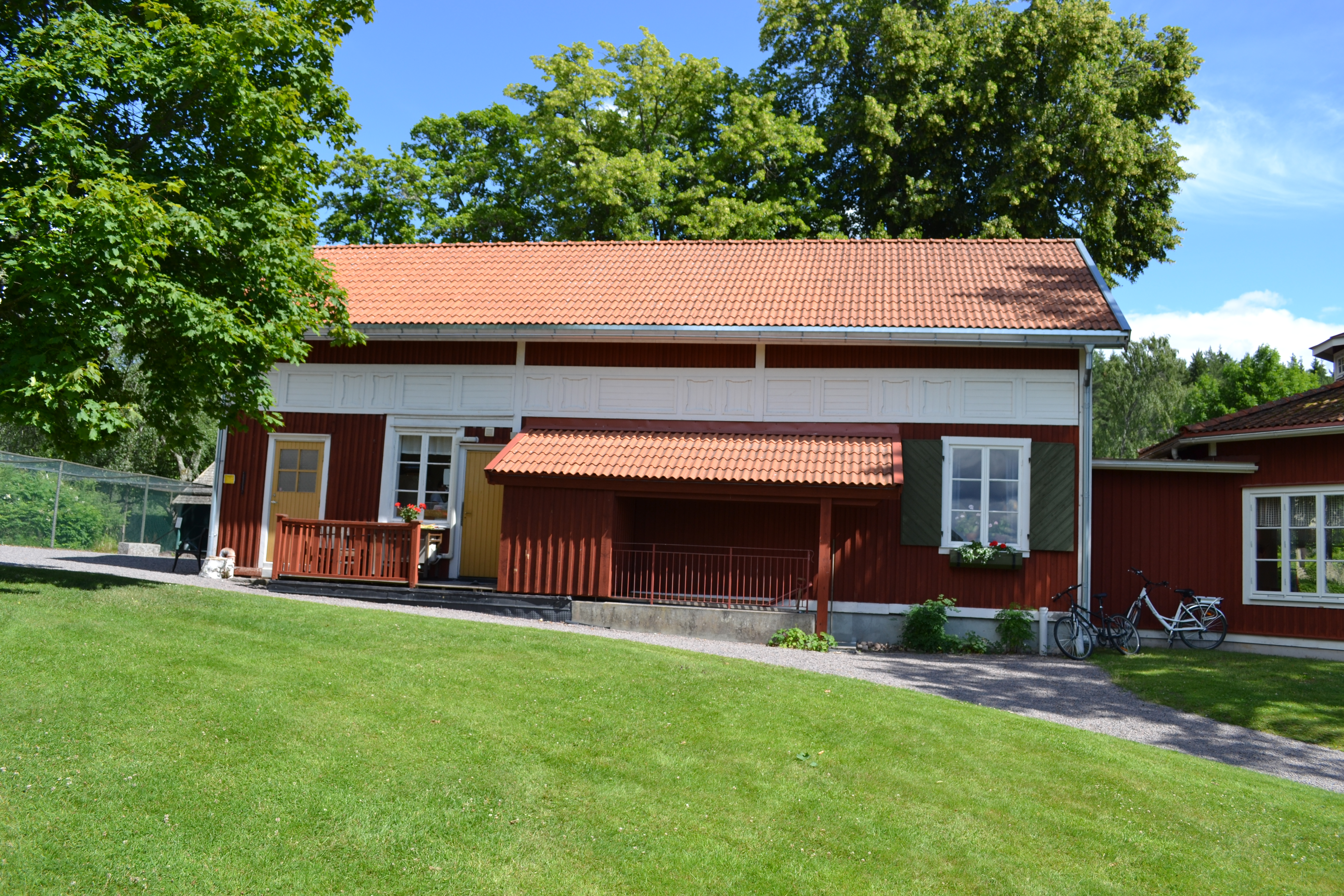 Wikipedia-läger Molkom 2016